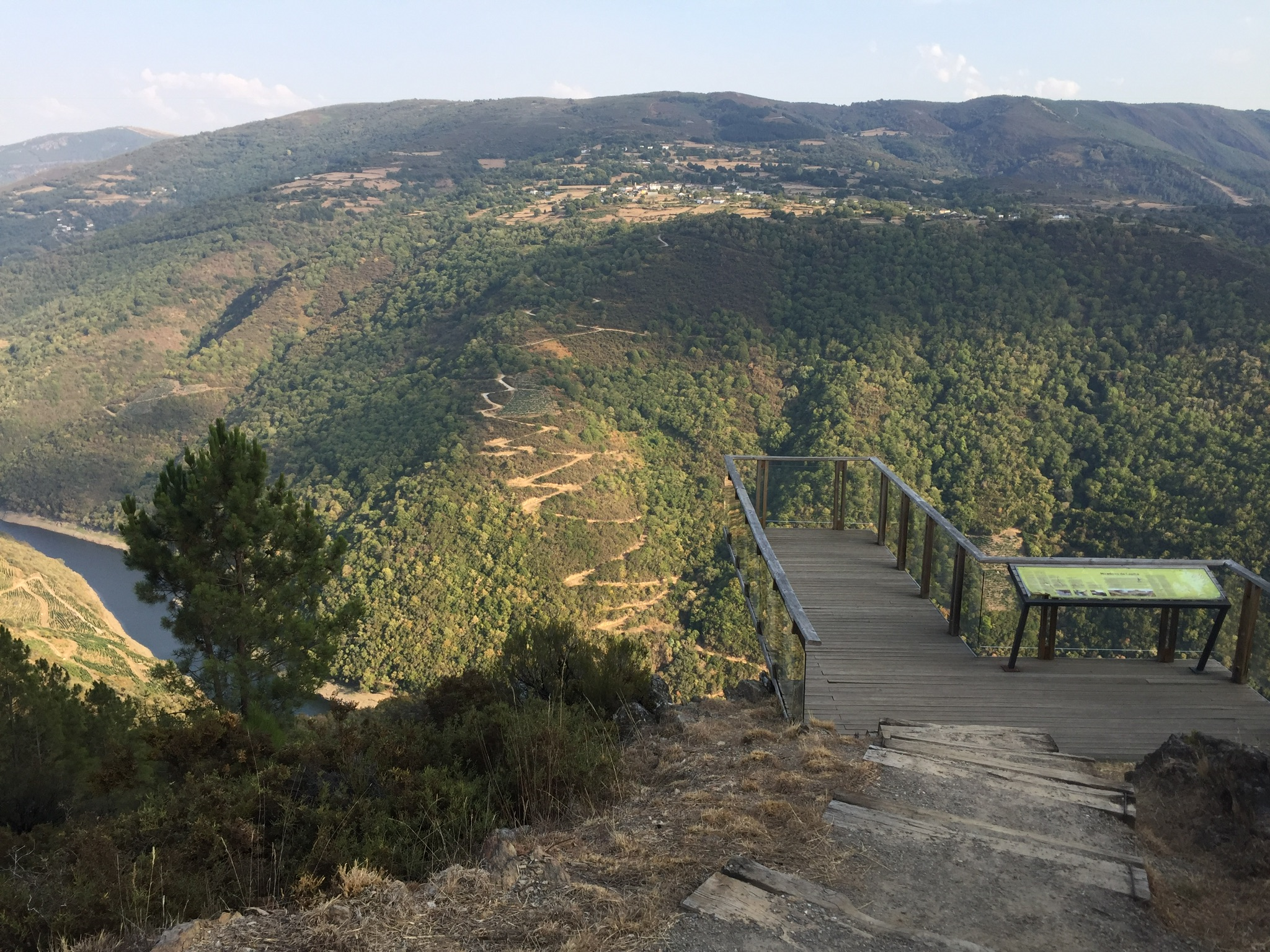 Mirador de A Capela, en el Cañón del Sil. En Vilachá, municipio de A Pobra do Brollón (Lugo, España).